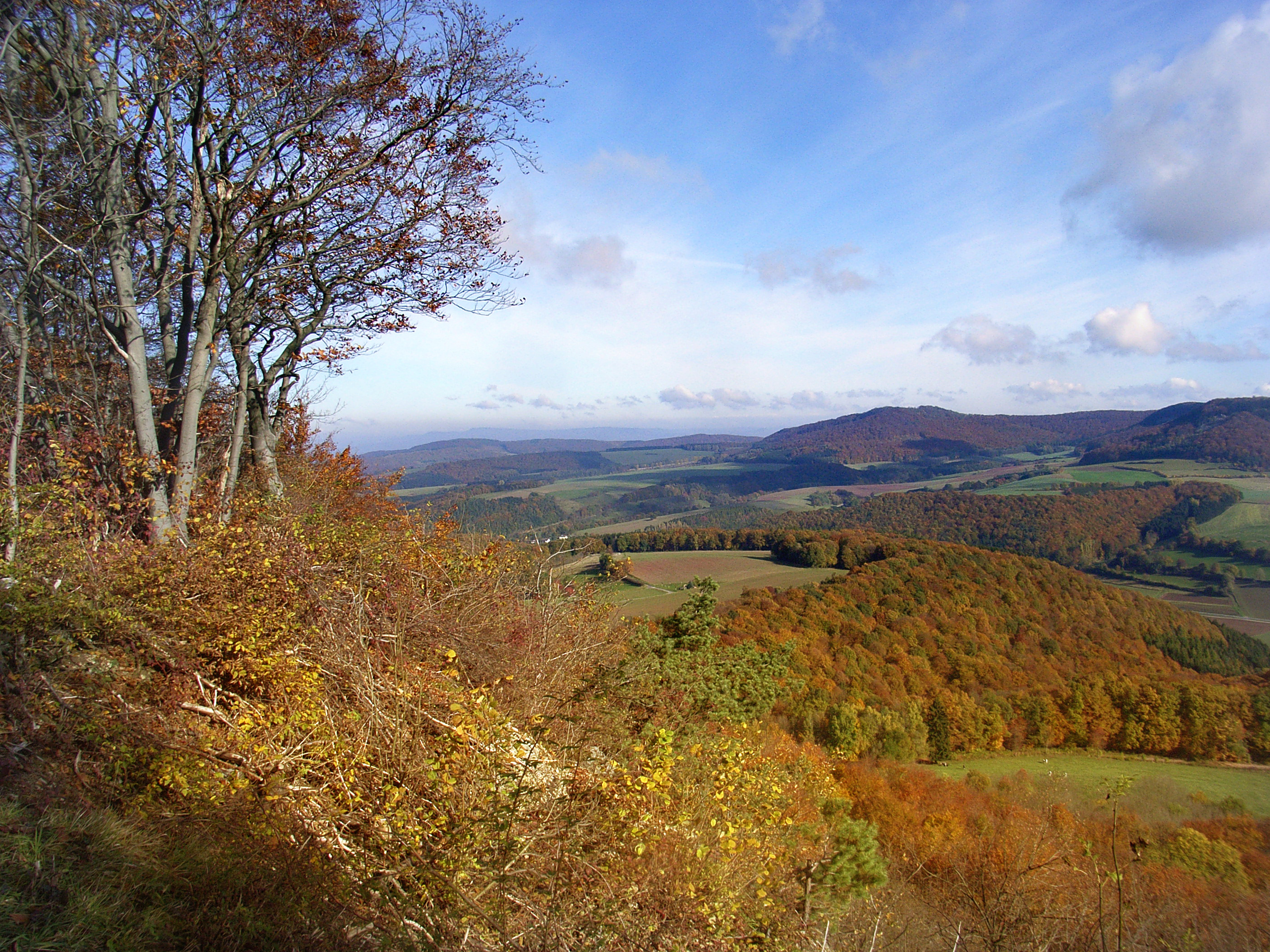 Herbst im hessischen Werra-Meißner-Kreis: Blick vom Holstein (Berg zwischen Weißenborn und Breitau in Sontra) in nordöstliche Richtung auf die Boyneburg (Hintergrund) im Naturschutzgebiet „Boyneburg und Schickeberg bei Breitau“.